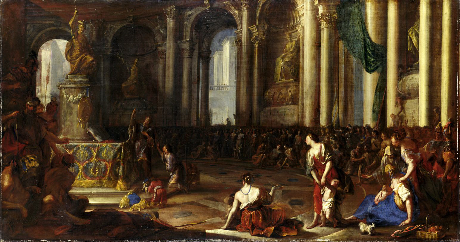 Hannibal schwört den Römern ewige Feindschafttitle QS:P1476,de:"Hannibal schwört den Römern ewige Feindschaft"